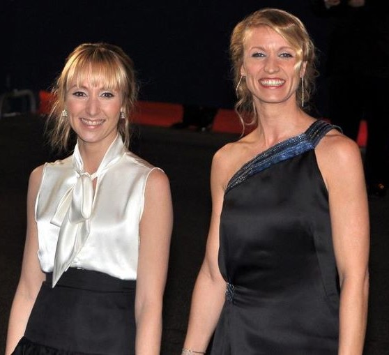 Audrey Lamy et Alexandra Lamy à la cérémonie des César